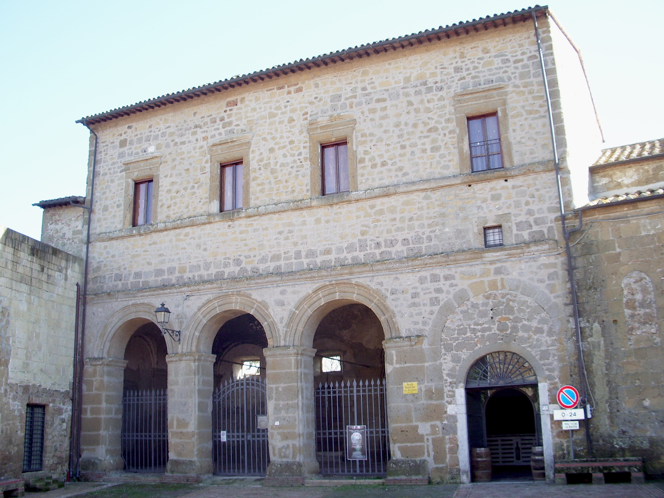 Il Palazzo Bourbon del Monte a Sovana